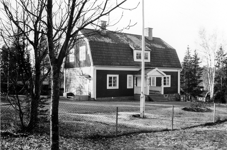 Stäketskolan. Exteriör. 1961. Bildnr 07610.